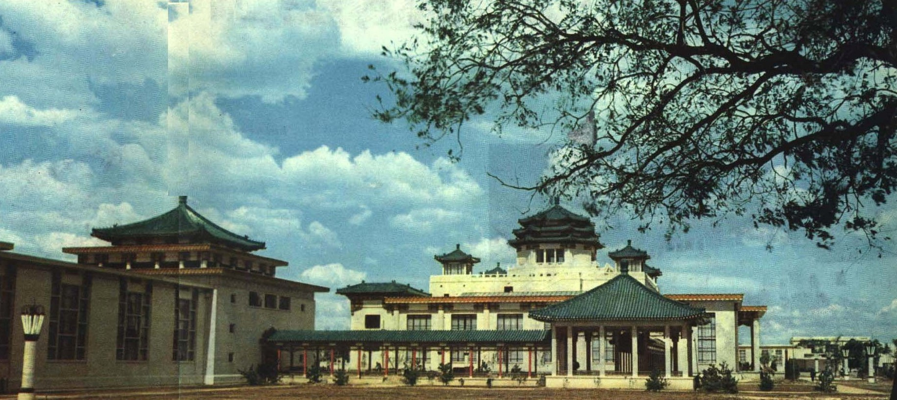 1963-02 1963年 全国农业展览馆